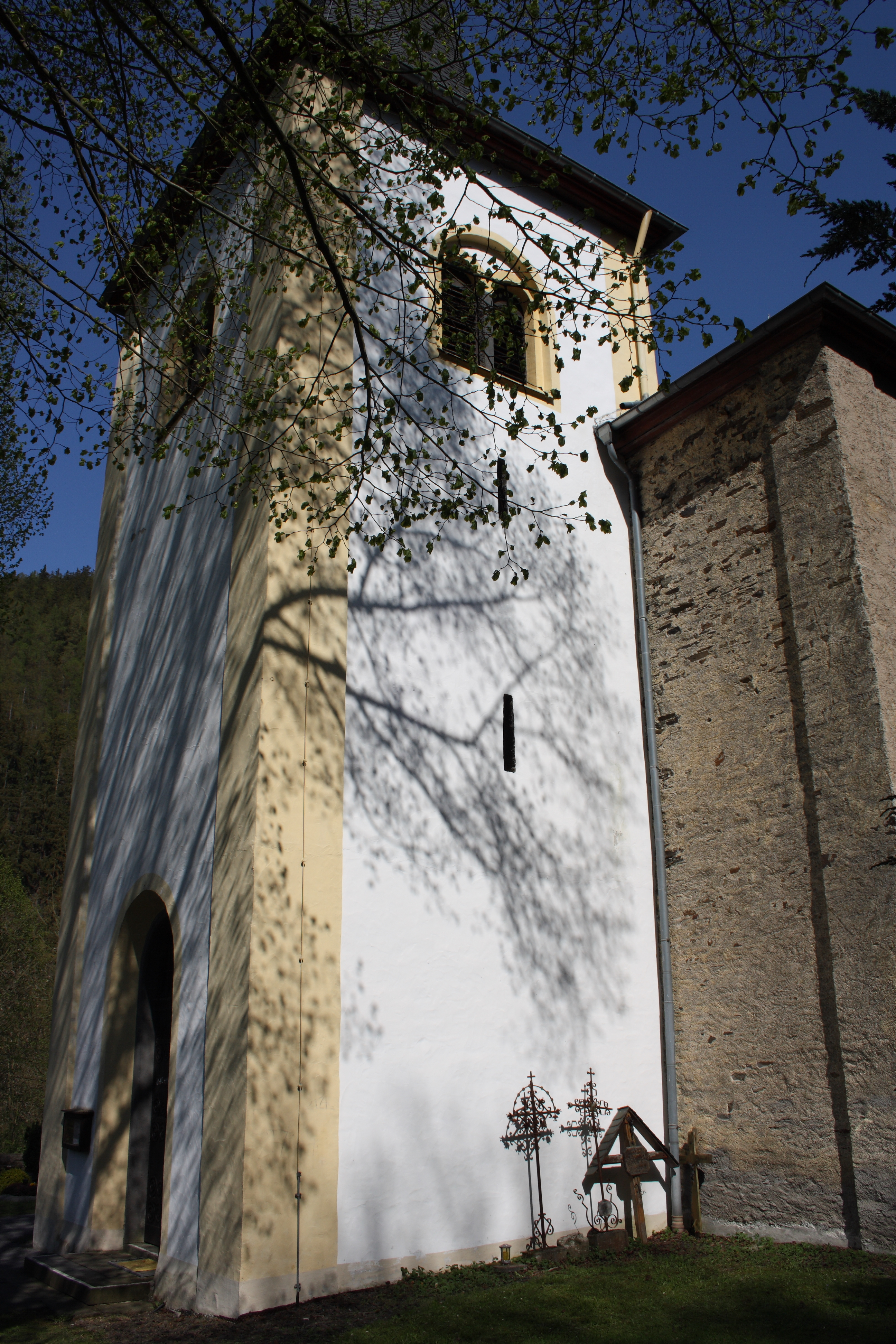 katholischen Kirche St. Pankratius und Margarita in Niederheckenbach, einem Ortsteil von Heckenbach